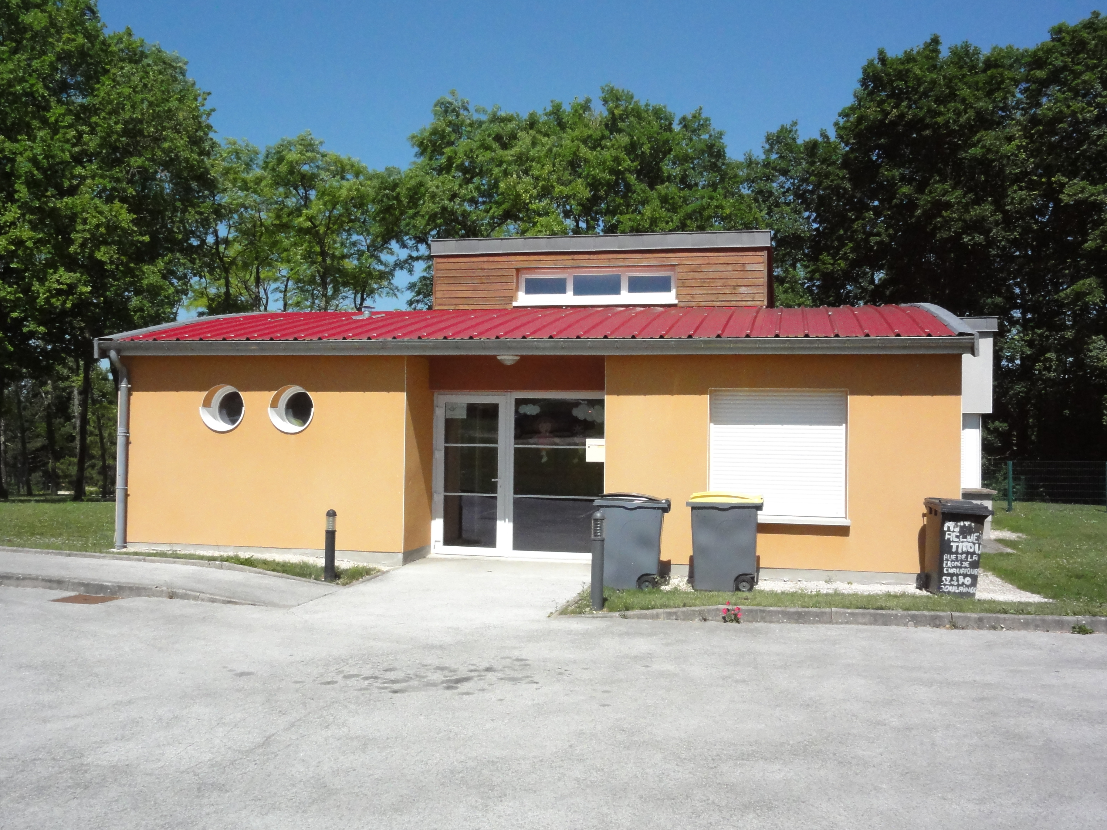 Doulaincourt, crèche